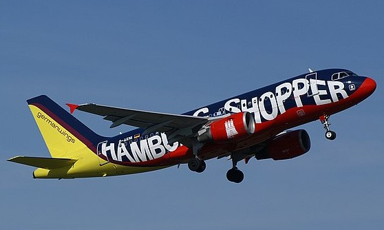 Germanwings Airbus A319-112 Sonderlackierung „Hamburg Shopper“